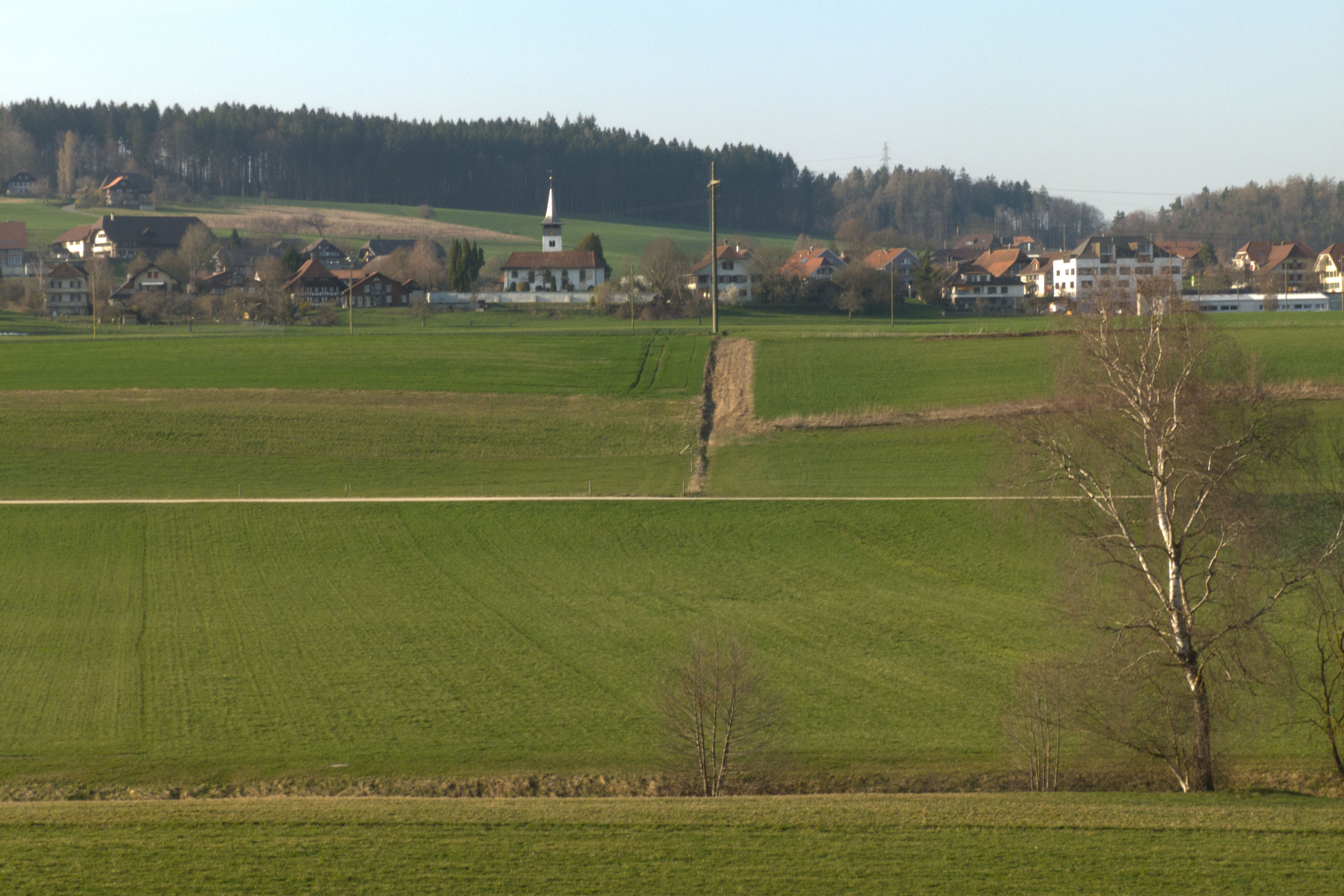 Kirchlindach von Süd mit Krebsbach